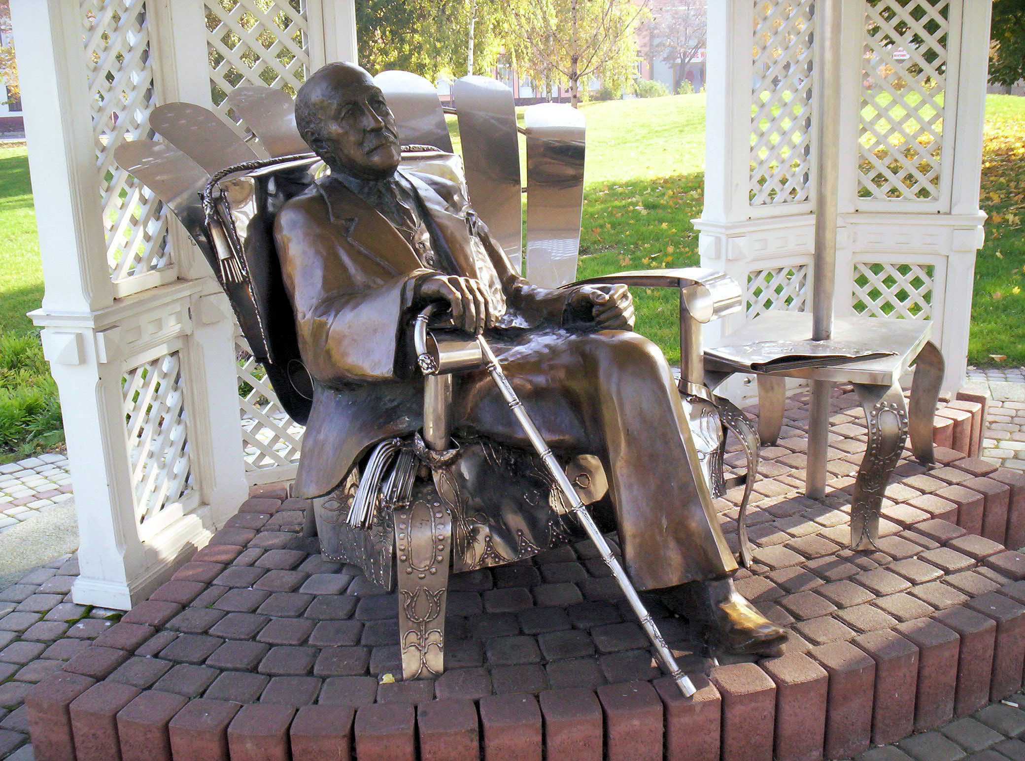 Kálmán Imre szobra Siófokon (Varga Imre alkotása) – photo taken by the uploader 2005